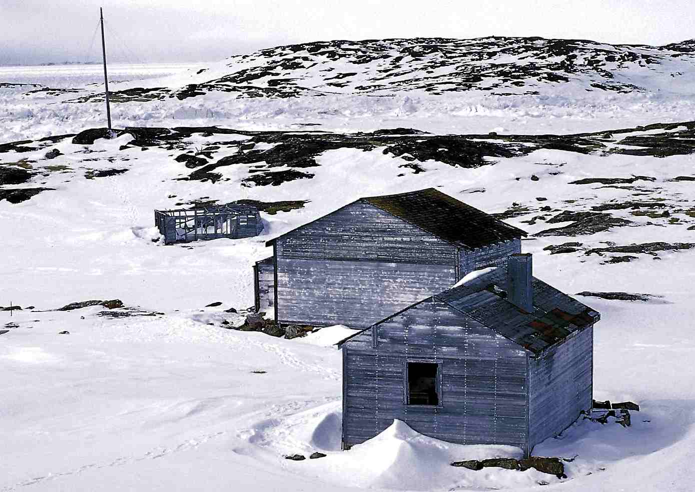 Abandonned Camp Ikirasaq